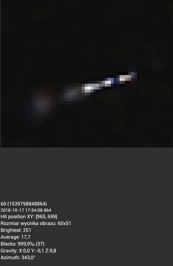 Rejestracja zdarzenia w aplikacji CREDO Detector